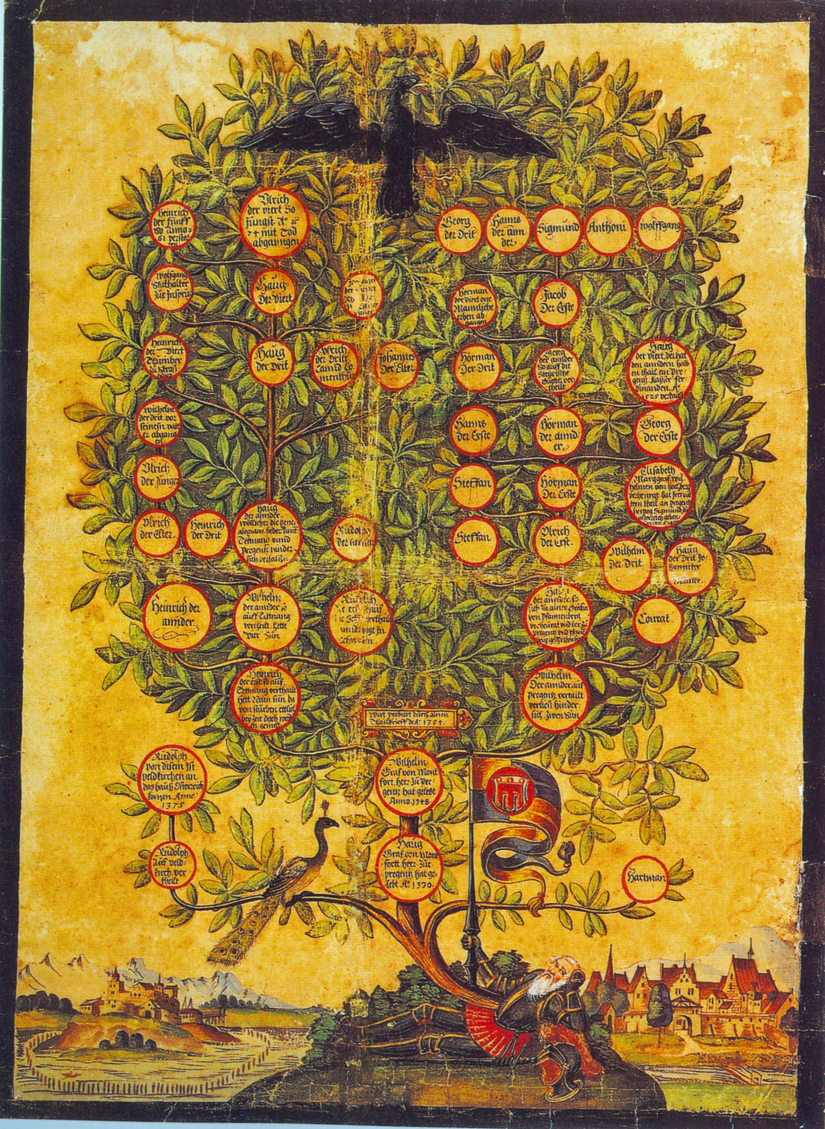 Stammbaum der Grafen von Montfort mit Ansichten des Schlosses Argen und der Stadt Tettnang